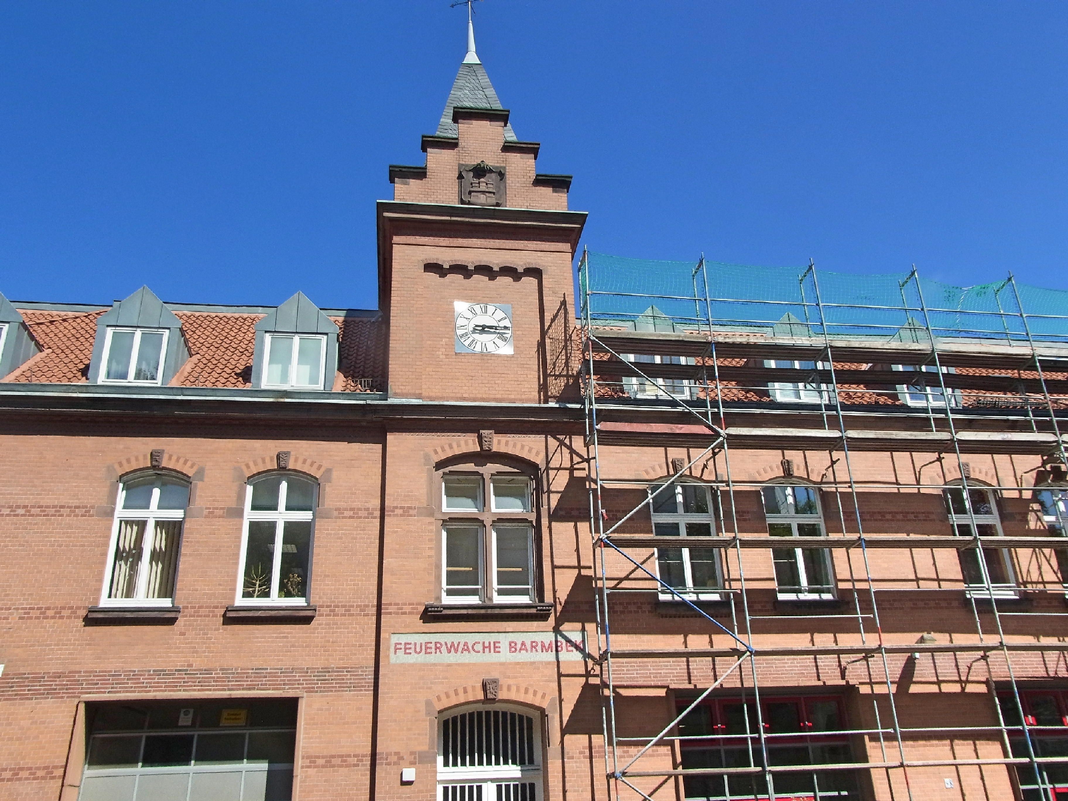 Die ehemalige Feuerwache Barmbek befindet sich in der Bachstraße 98 bzw. Imstedt 49. Ein roter Backsteinbau mit einem Uhrenturm in der Vorderseite zur Bachstraße. Das Gebäude wurde 1895 gebaut und wird heute von einer Kita genutzt. Zur Zeit befindet sich das Gebäude in einer Sanierung. Mehr zur Historie des Hauses unter: Kita Feuerwache e.V. is a photograph of an architectural monument.